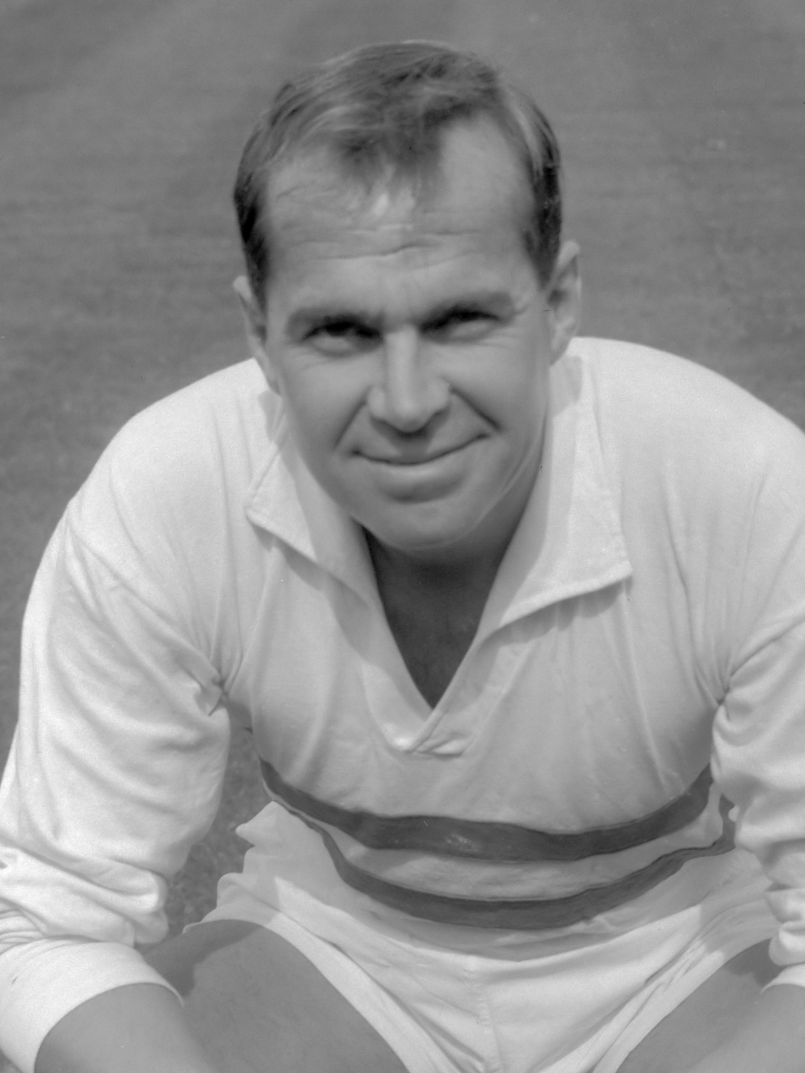 PSV tegen Fortuna 54 1-2, (kop) Van Rhijn 23 augustus 1964